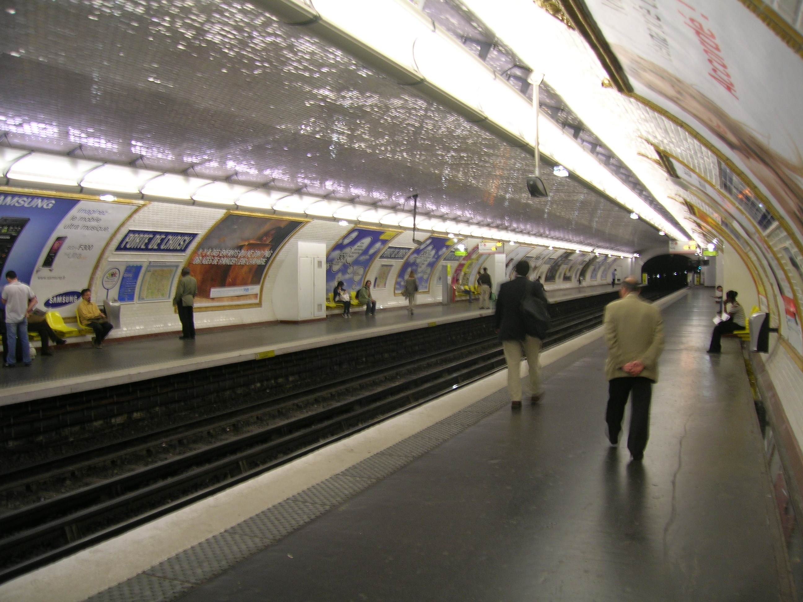 Quais de la station de métro Porte de Choisy ligne 7, Paris